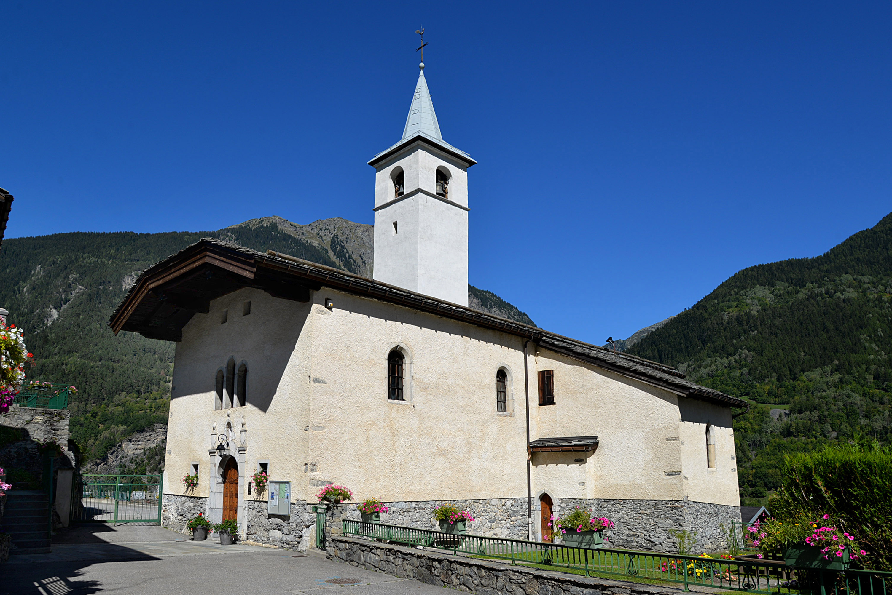 Villaroger (Savoie)